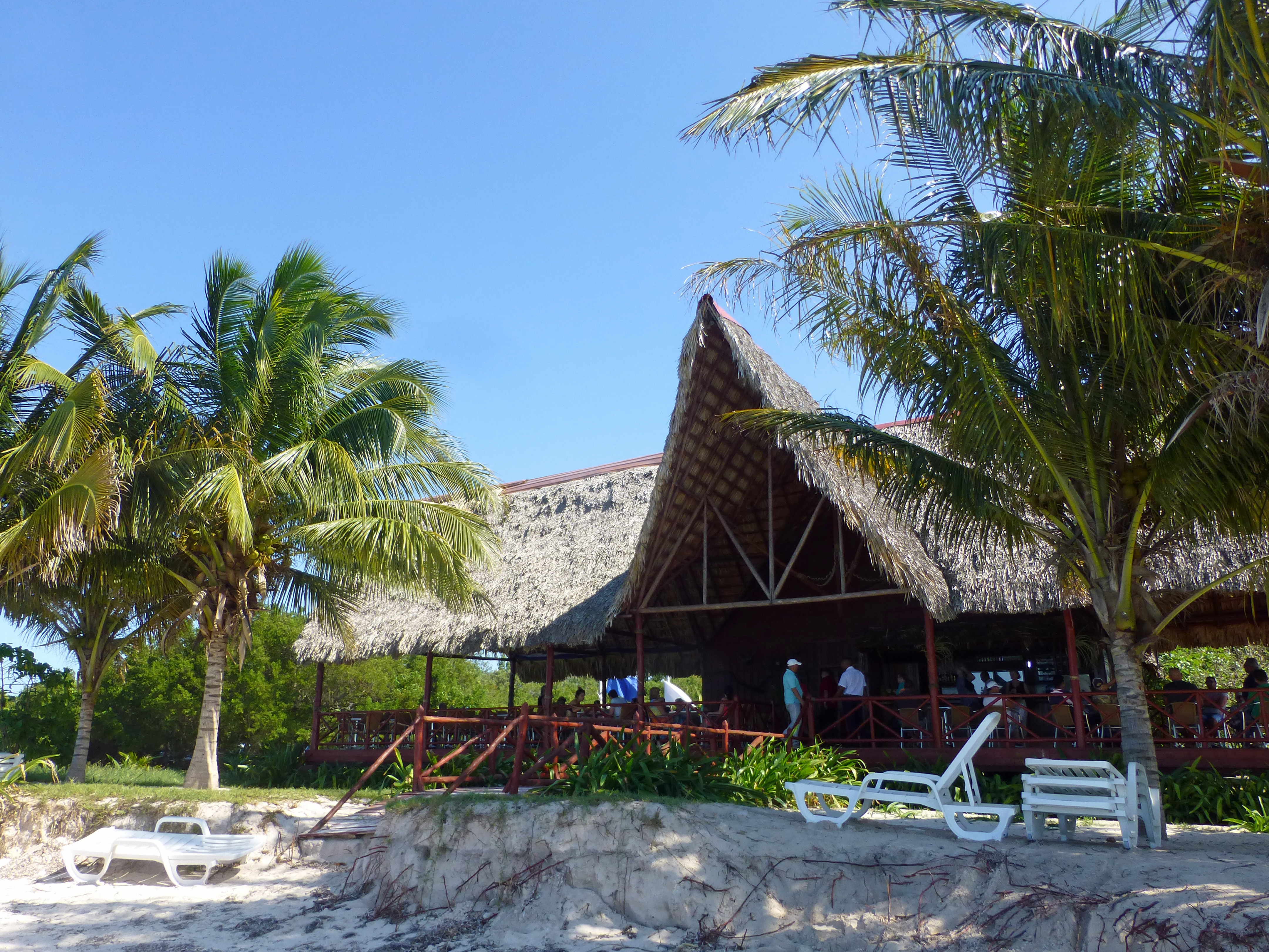 restaurant de l'île de Cayo Jutías (Cuba) en 2005